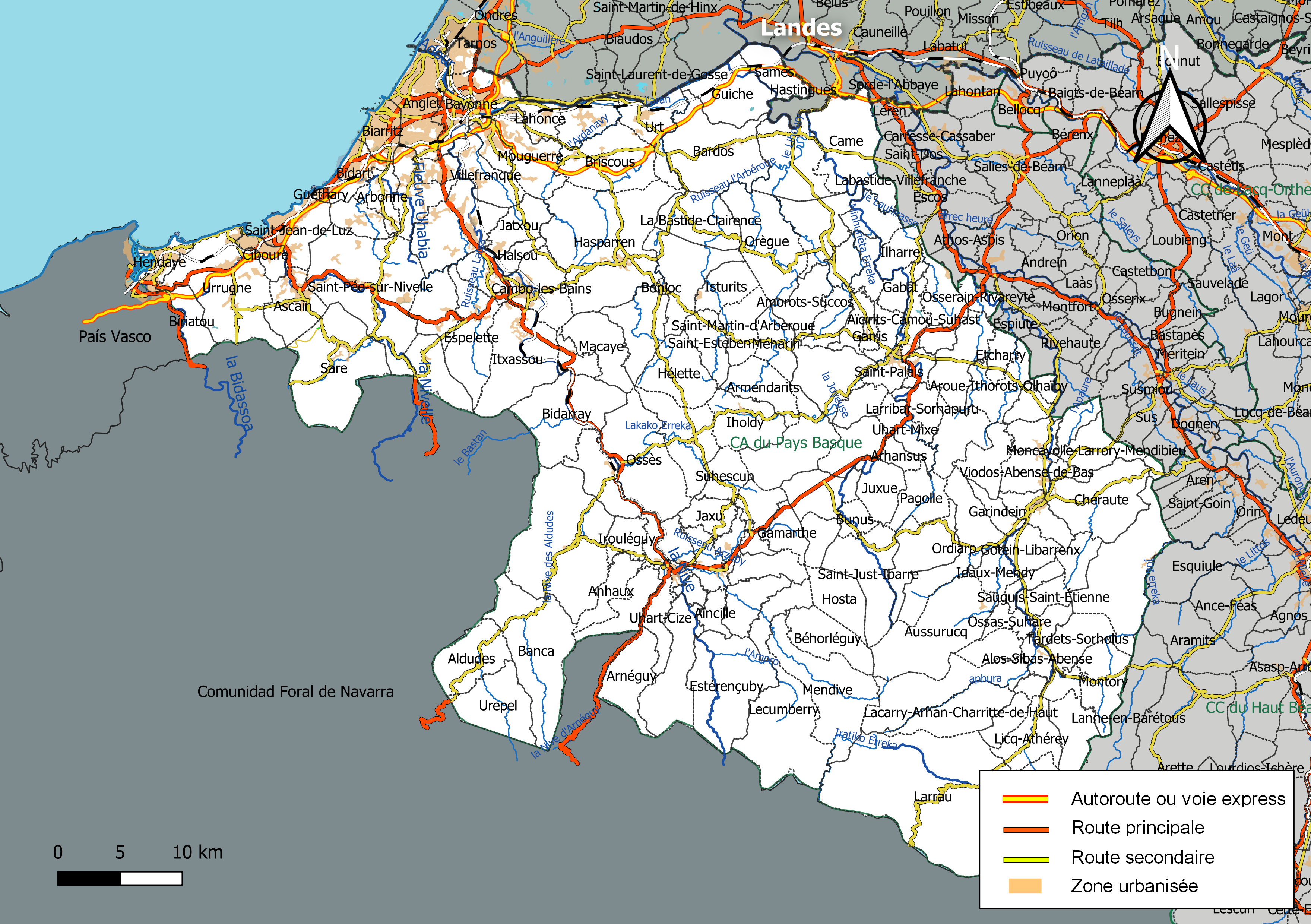 Carte géographique de la Communauté d'agglomération du Pays Basque, département des Pyrénées-Atlantiques, France. Composition au 1er janvier 2019.